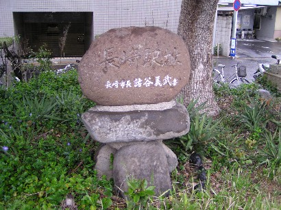 2005/03/27に投稿者が浦上駅にて撮影